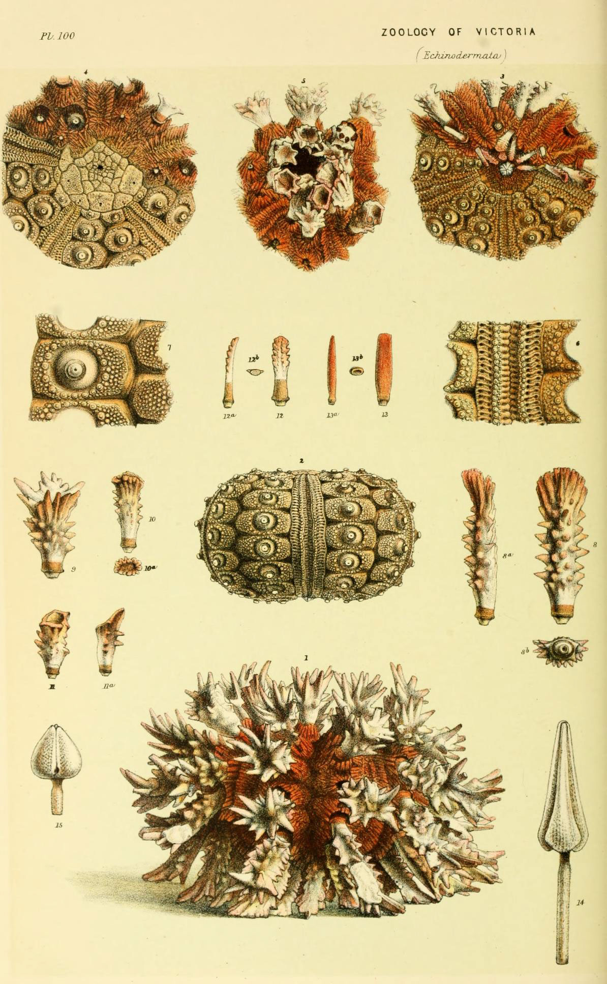 Fb. 100 ZOOLOGY OF VICTORIA I EchuwderrruUcu ) B^^. IZO' U""